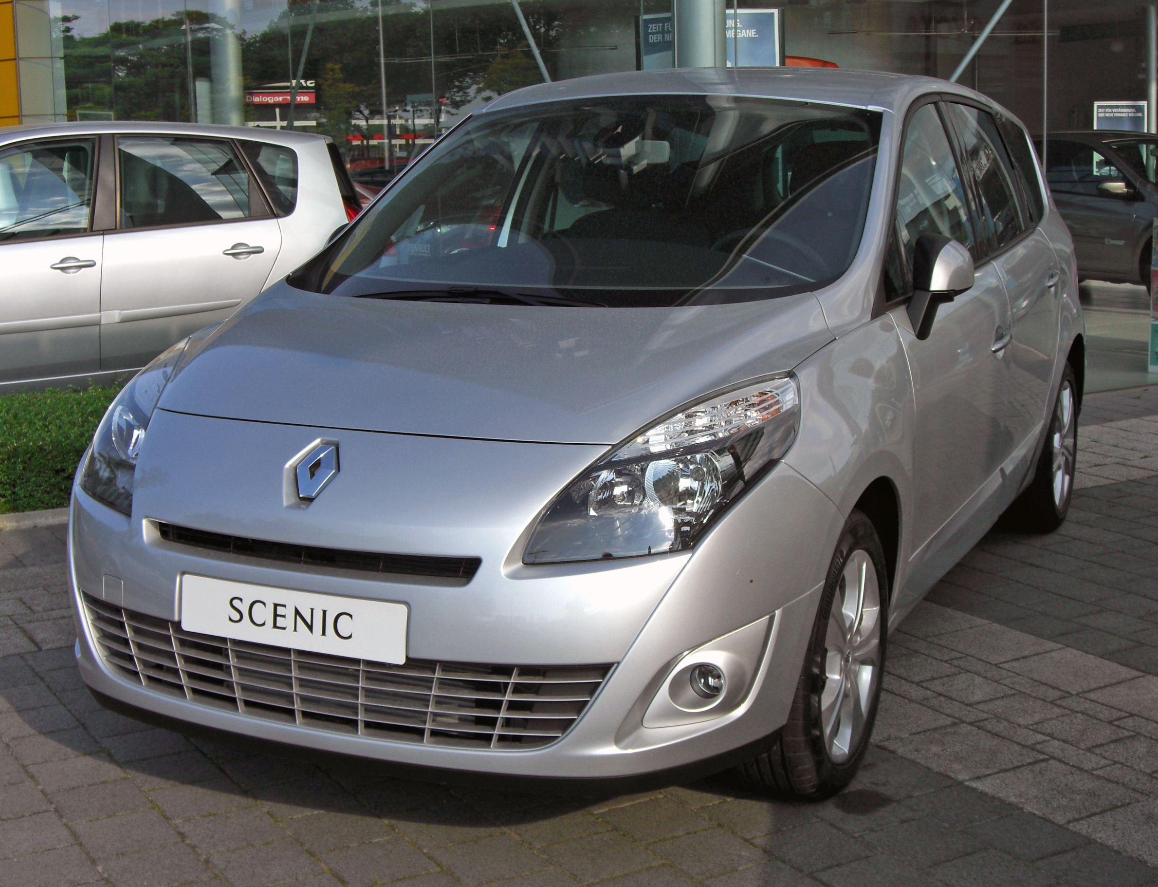 Renault Grand Scénic III